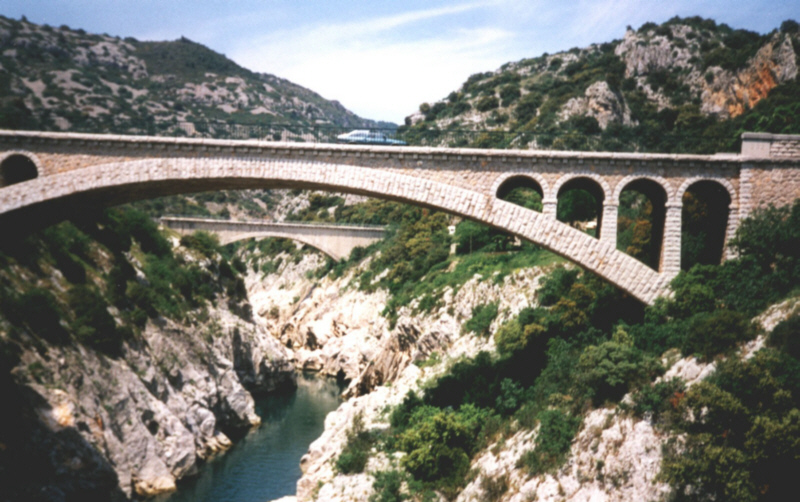 Brücken über den l'Herault, Frankreich